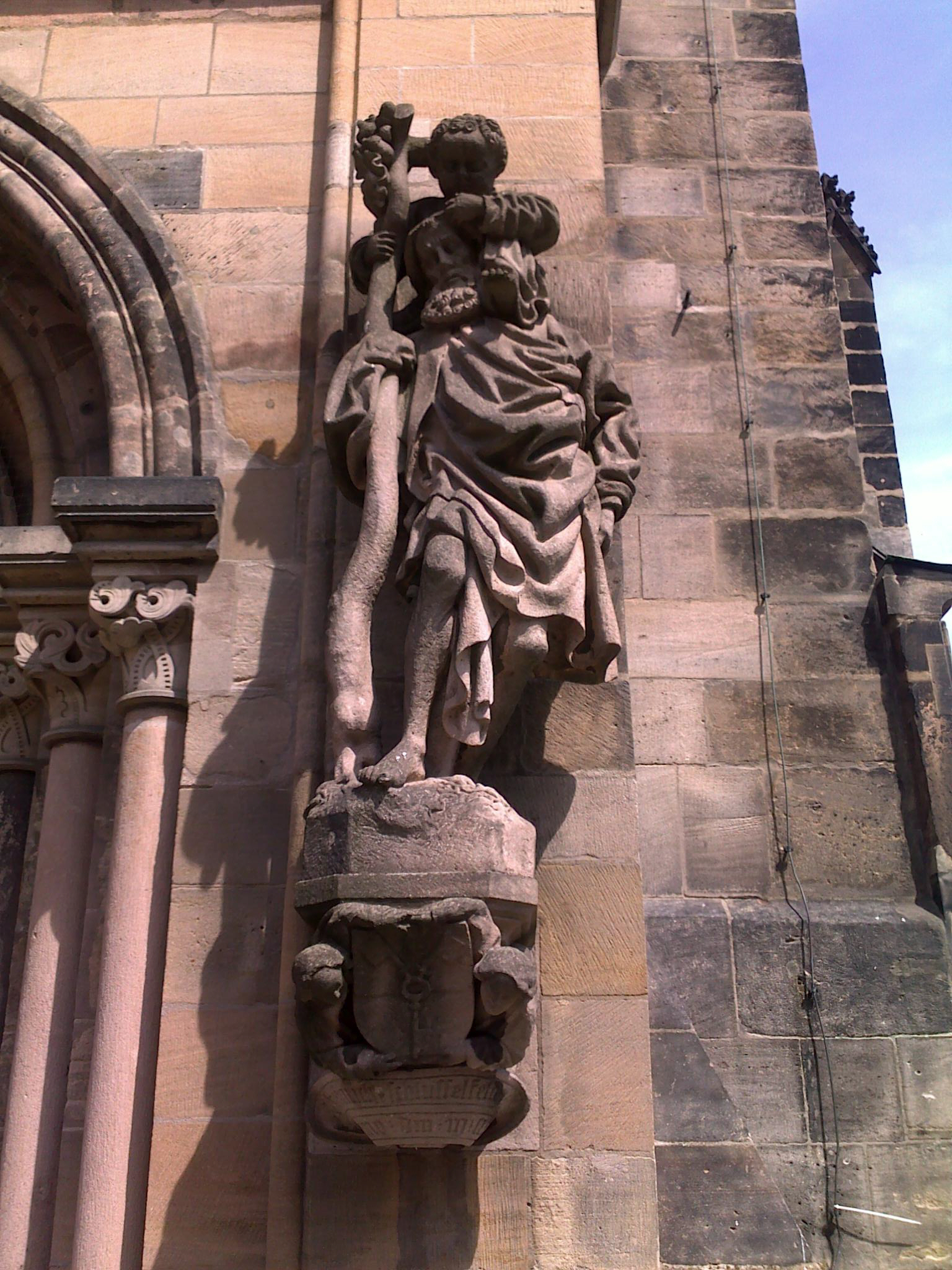 St. Sebald Nürnberg - Westseite - Epitaph für Heinrich Schlüsselfelder